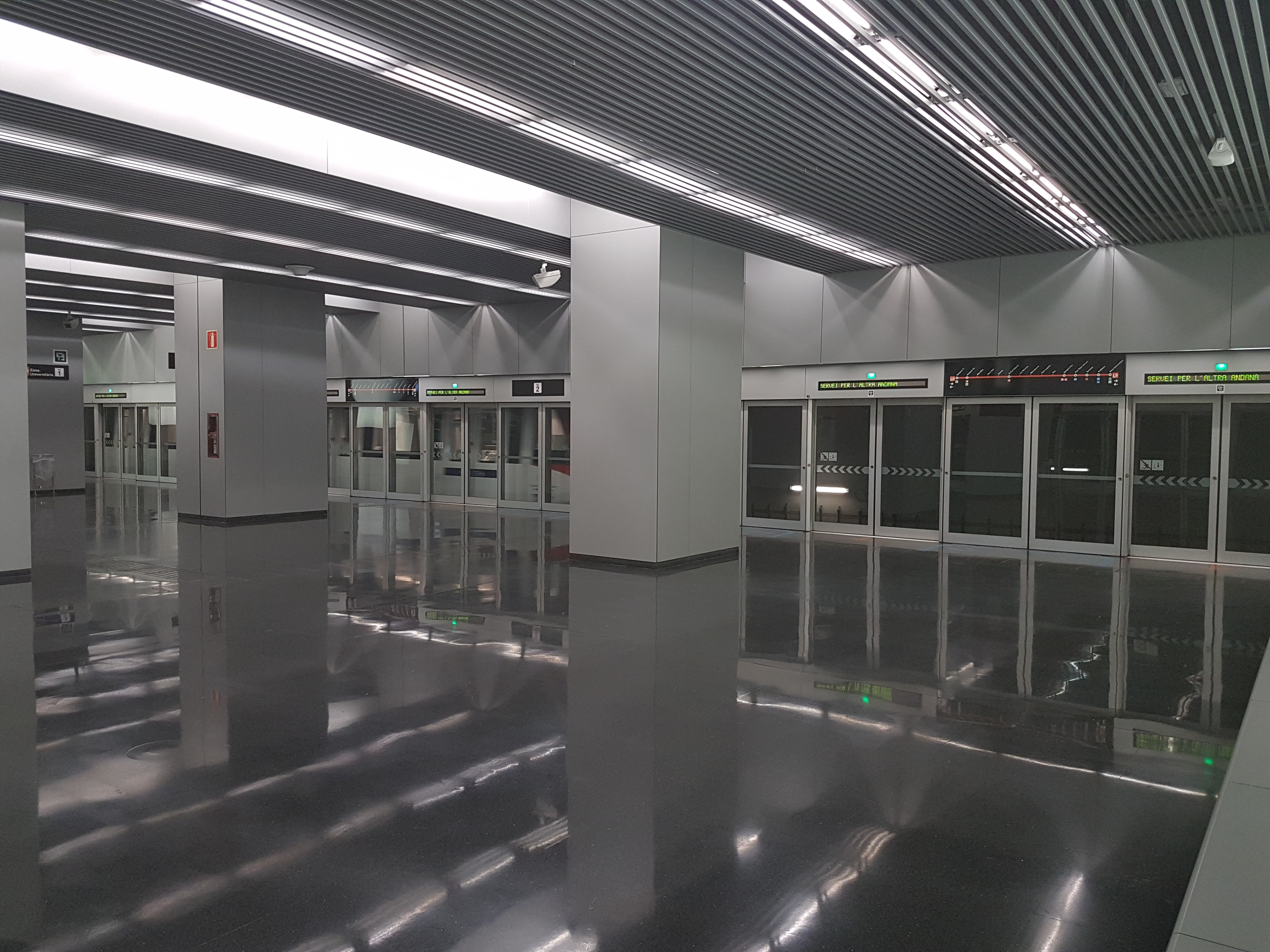 Vestibul de l'estació Aeroport T1 de la línia 9 del metro de Barcelona